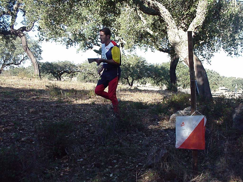 Description